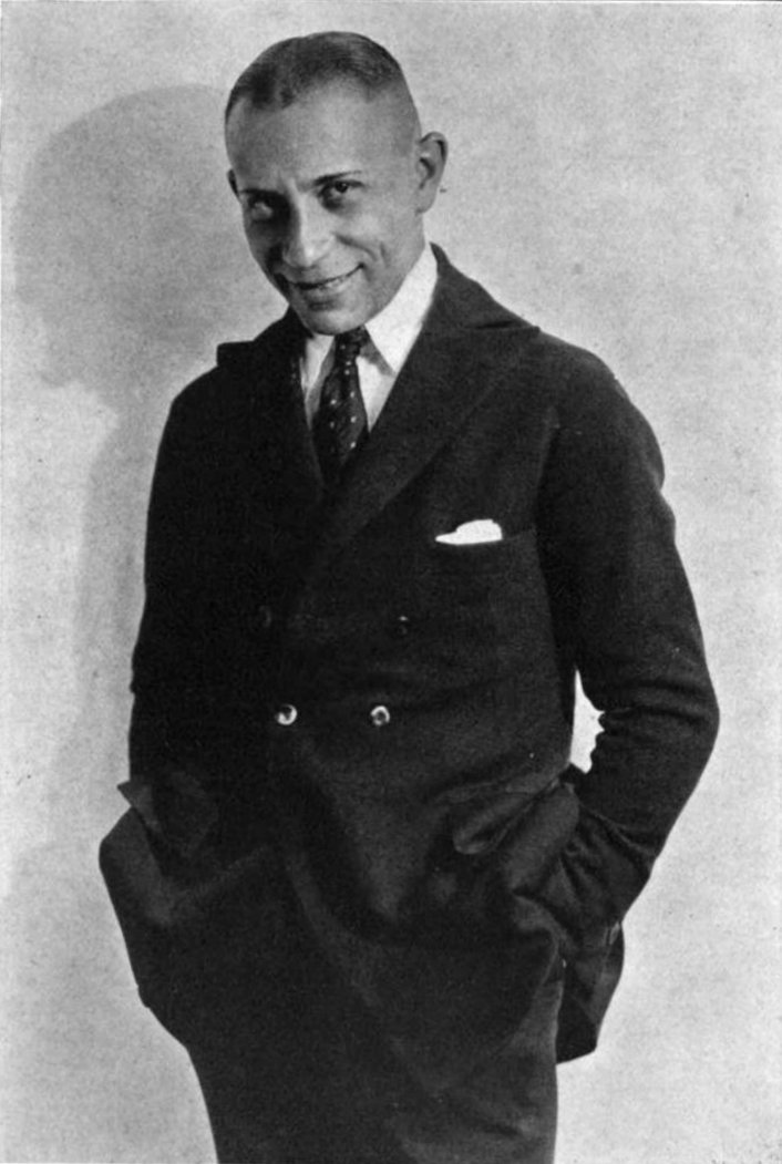 Portrait of Erich von Stroheim.